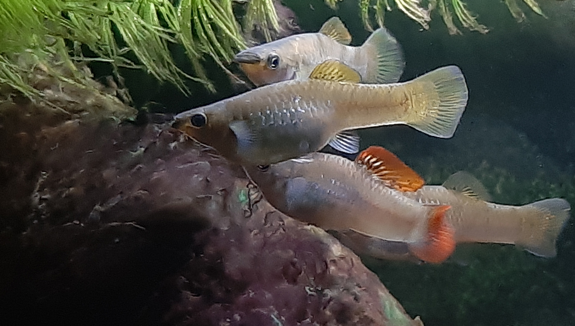 Poecilia salvatoris